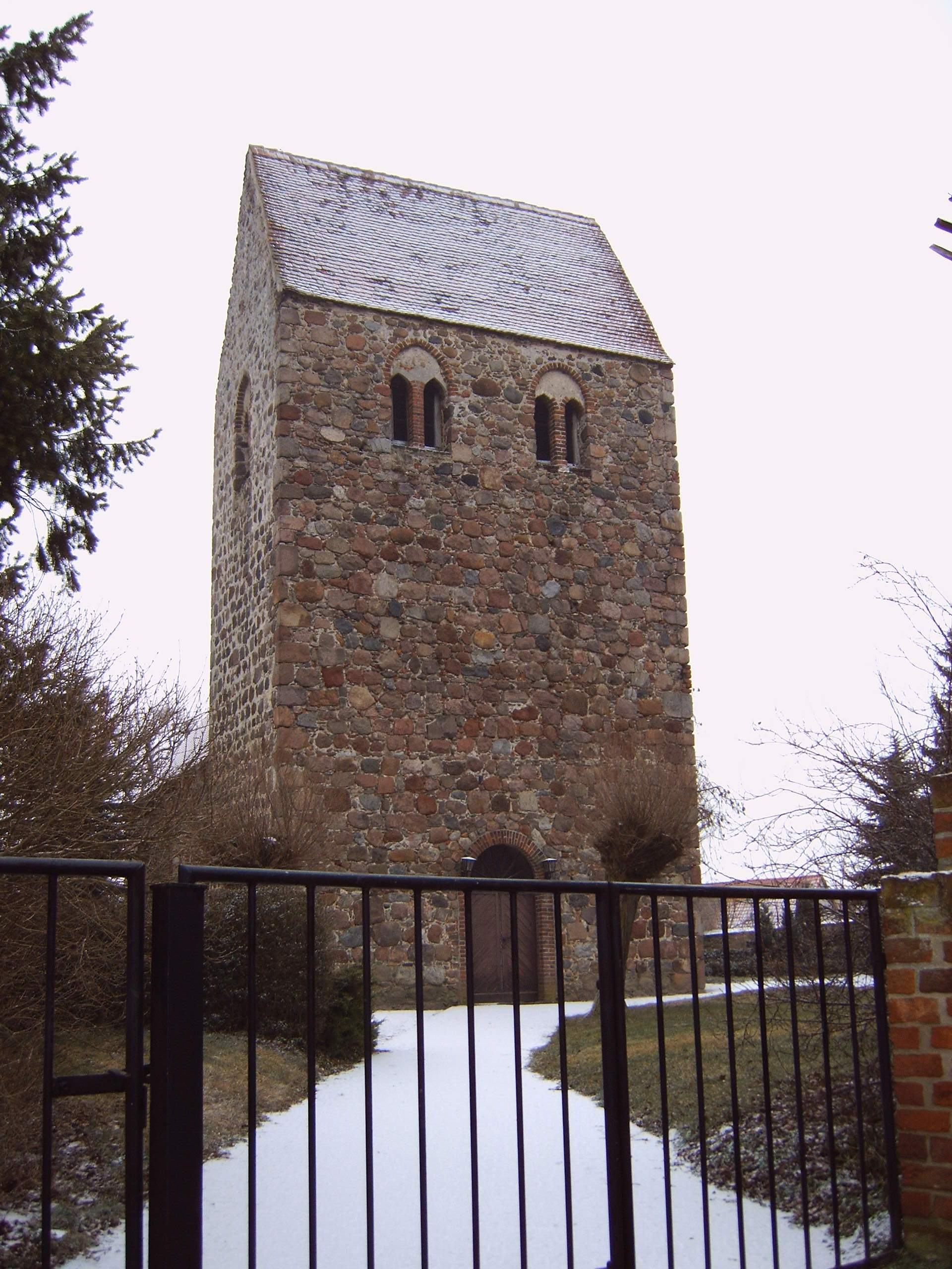 Dorfkirche in Gohre (Deutschland, Sachsen-Anhalt), Bild aufgenommen von Olaf Meister am 3.2.2006